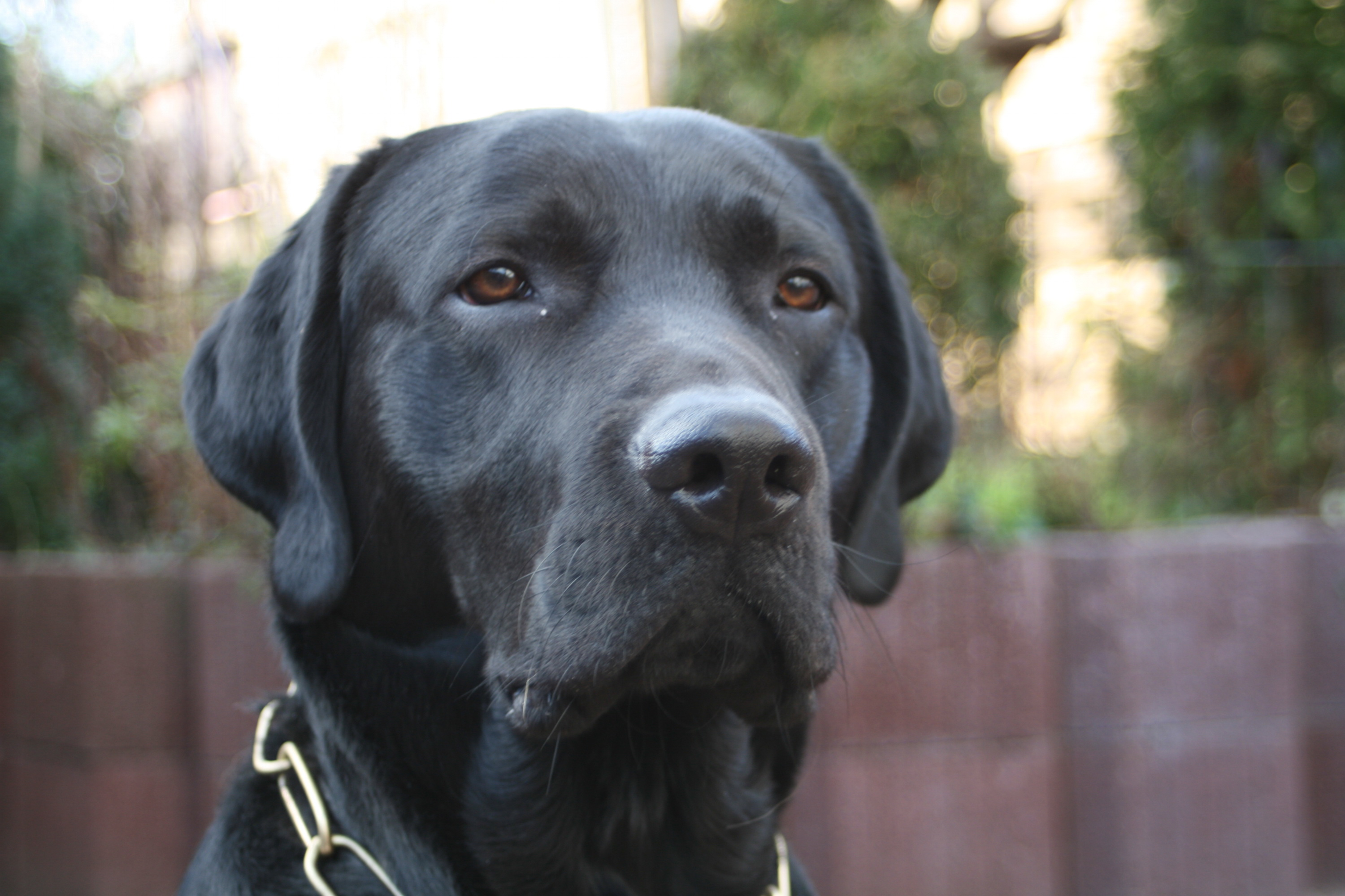 Schwarzer Labrador Retriever, Rüde.